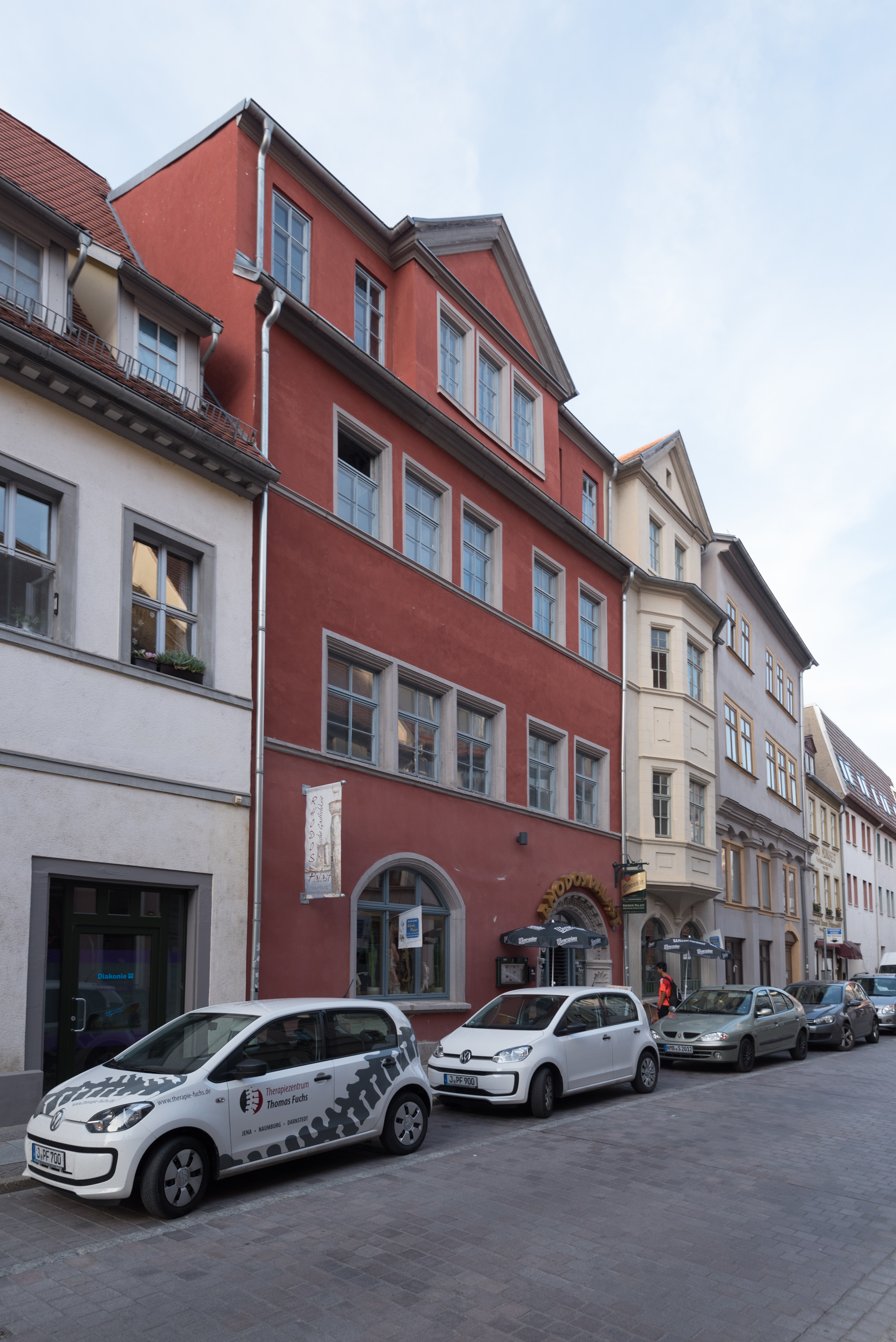 Naumburg (Saale), Marienstraße 35